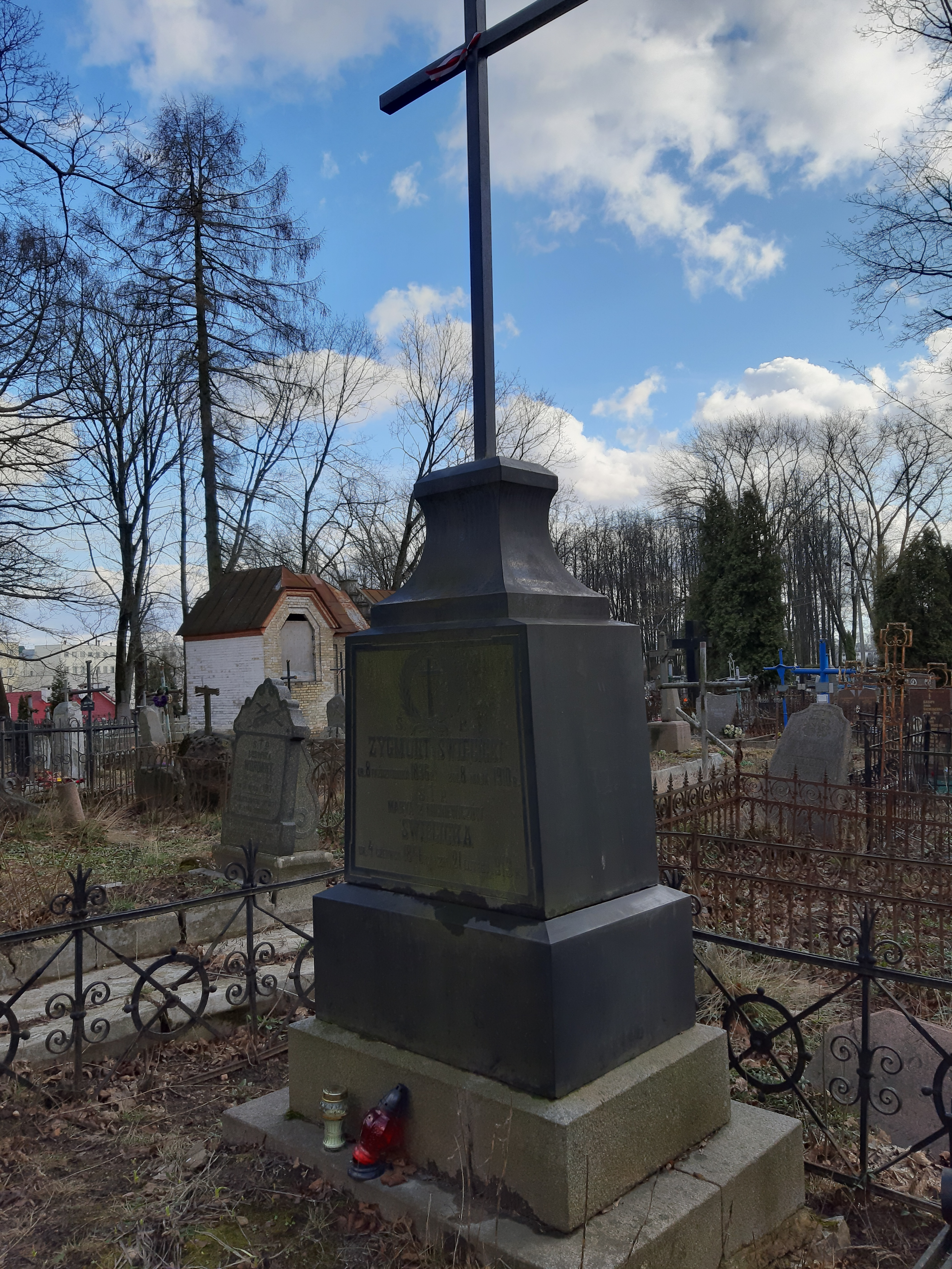 Мінск. Кальварыйскія могілкі. 2020